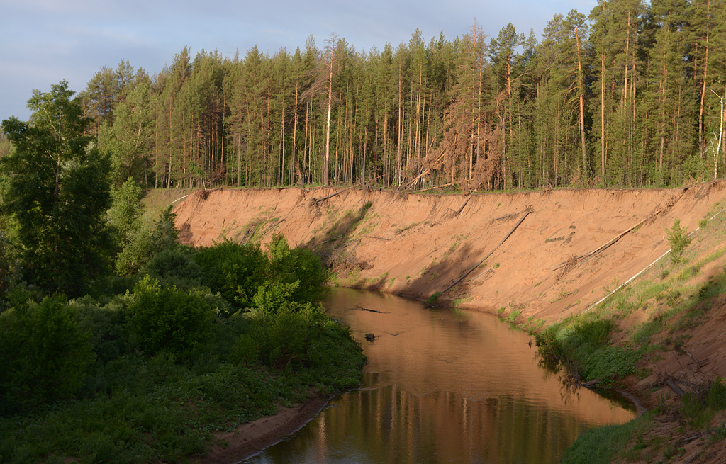 Речка Боровка, национальный парк "Бузулукский бор"